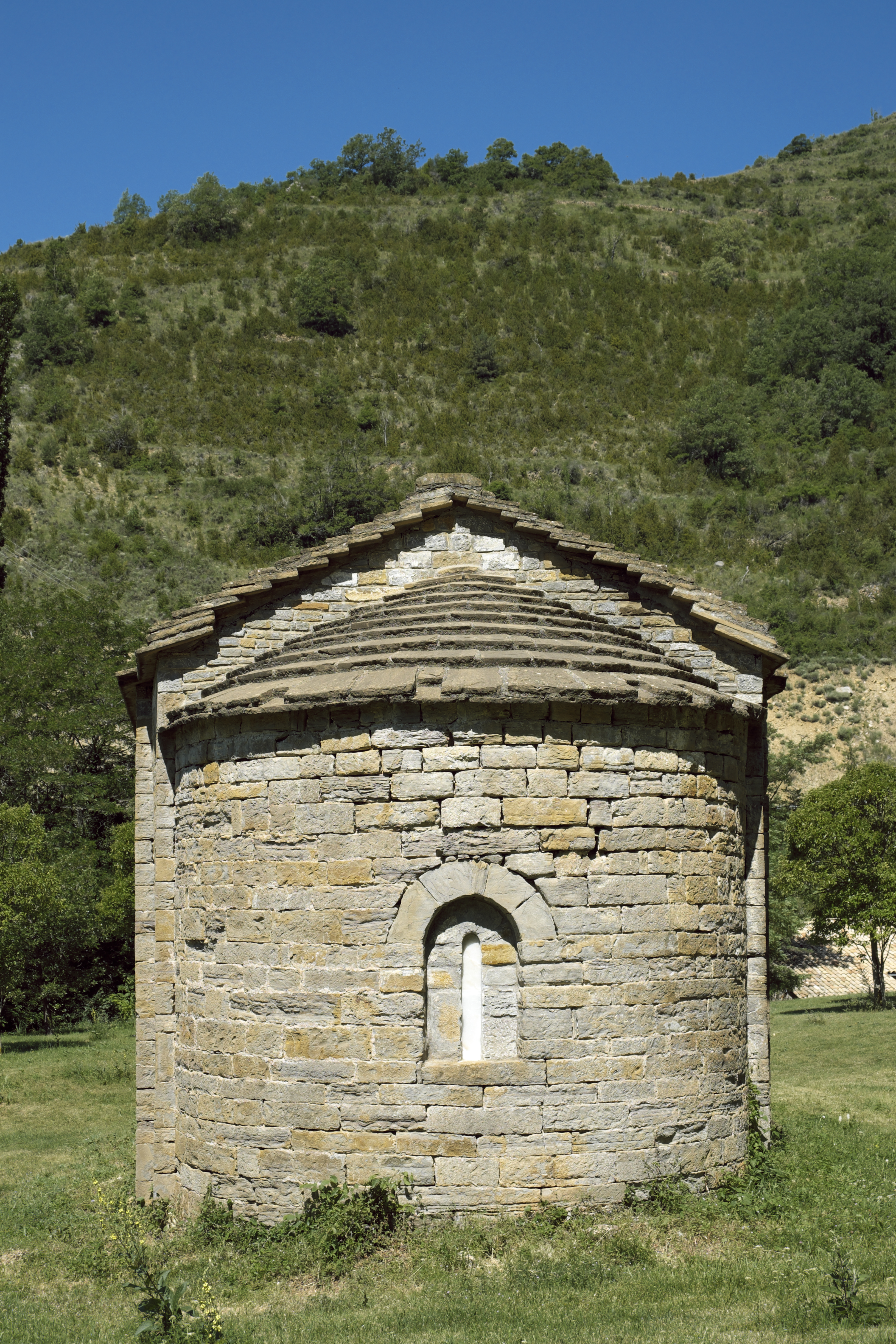 Ermita San Pablo des ehemaligen Benediktinerklosters Santa María de Obarra in Beranuy in der Provinz Huesca (Aragón/Spanien), Apsis